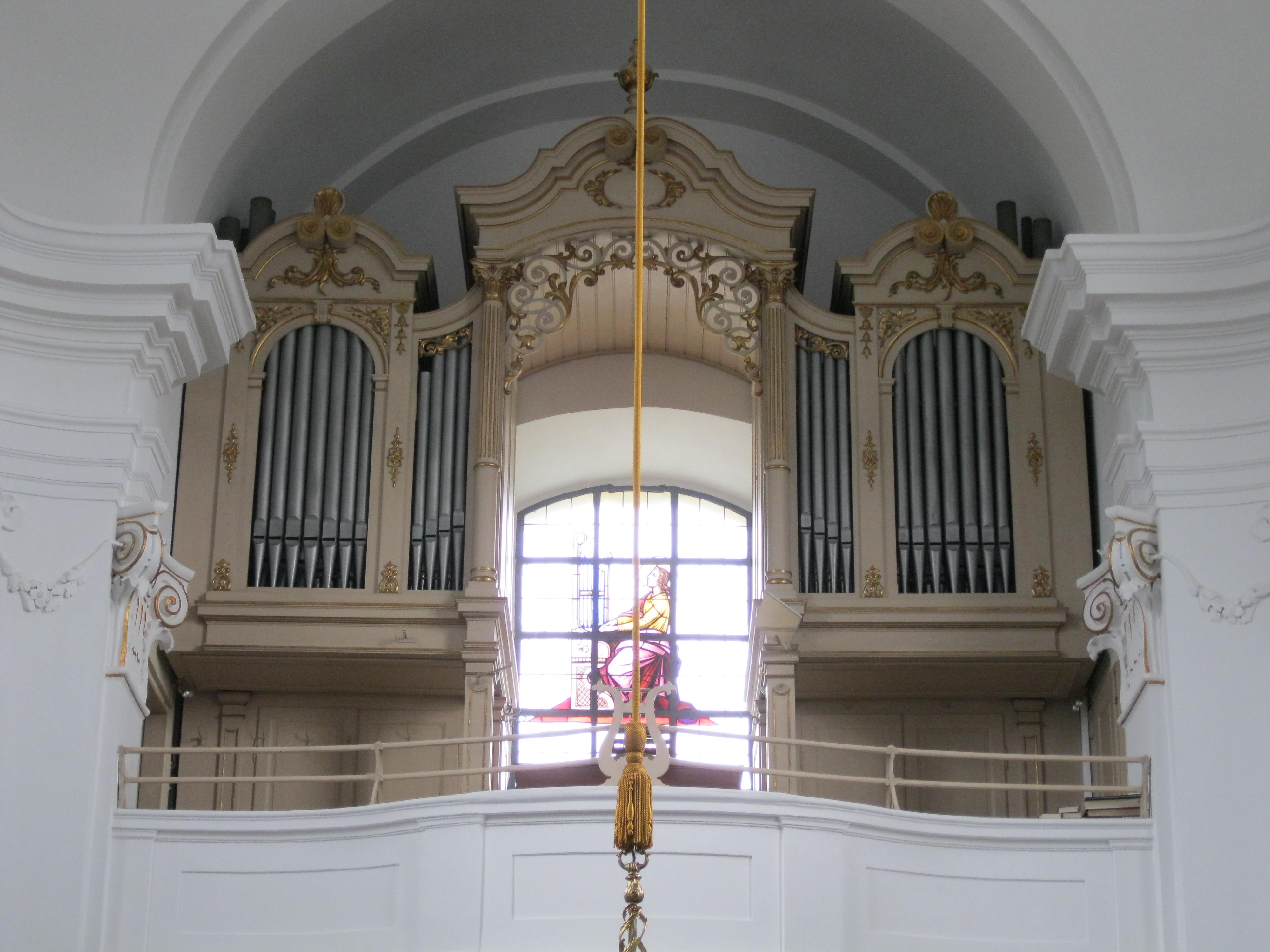 Kauffmann-Orgel der Bergkirche Rodaun, Wien 23